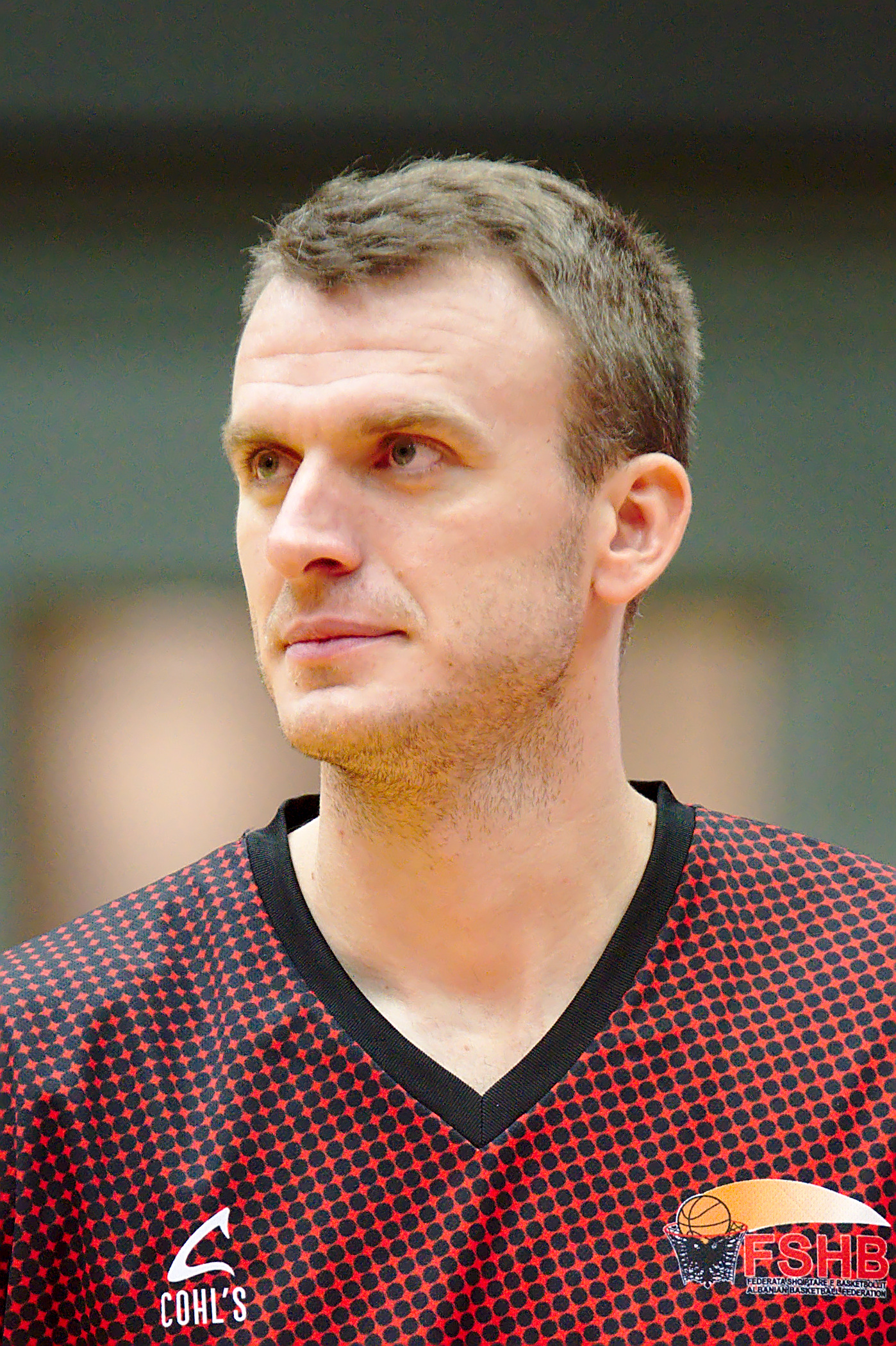 FIBA WM-Vorqualifikationsspiel Österreich gegen Albanien, Foto zeigt: Gerti Shima